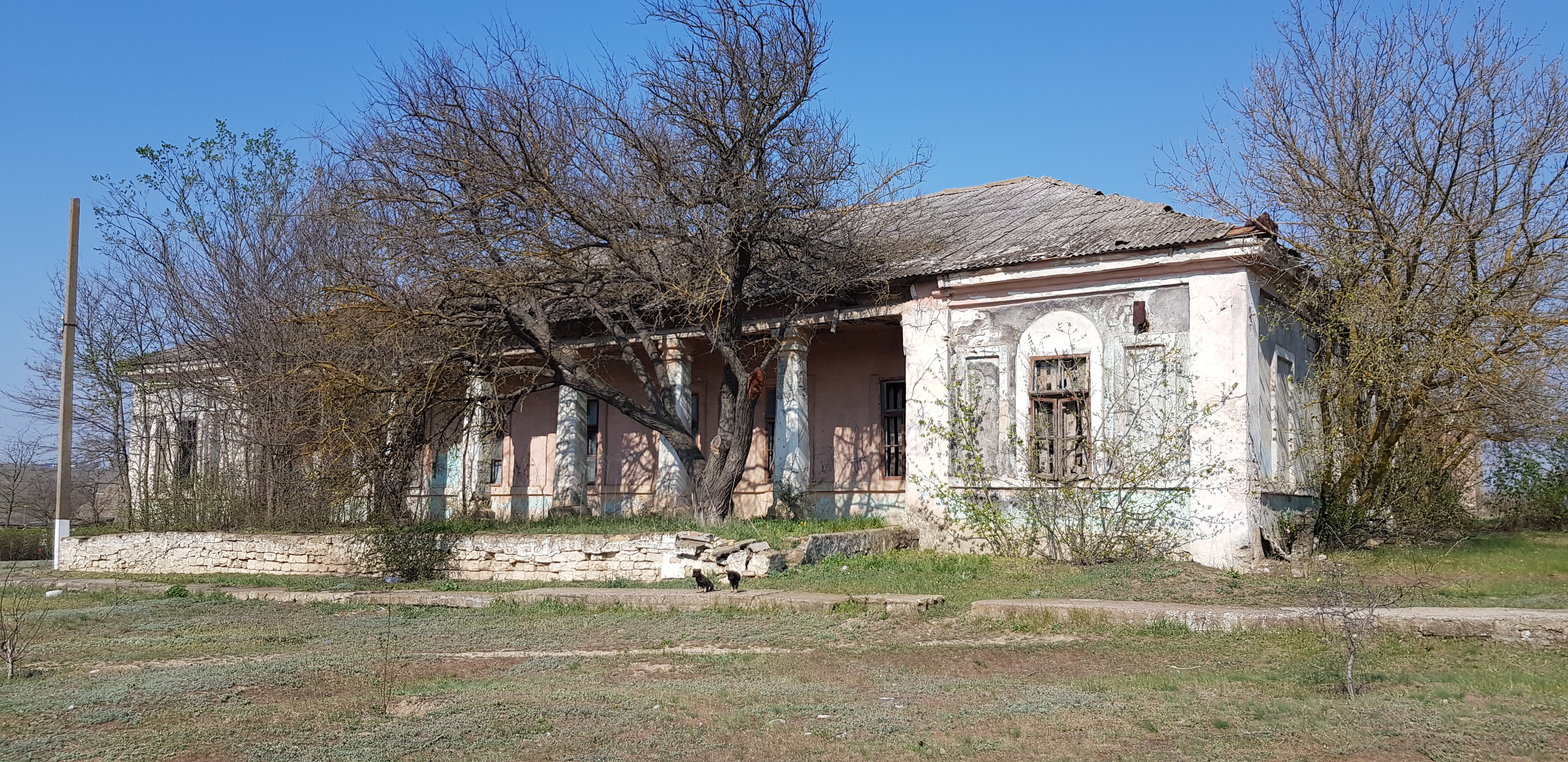 Заброшенная усадьба Гижицких.